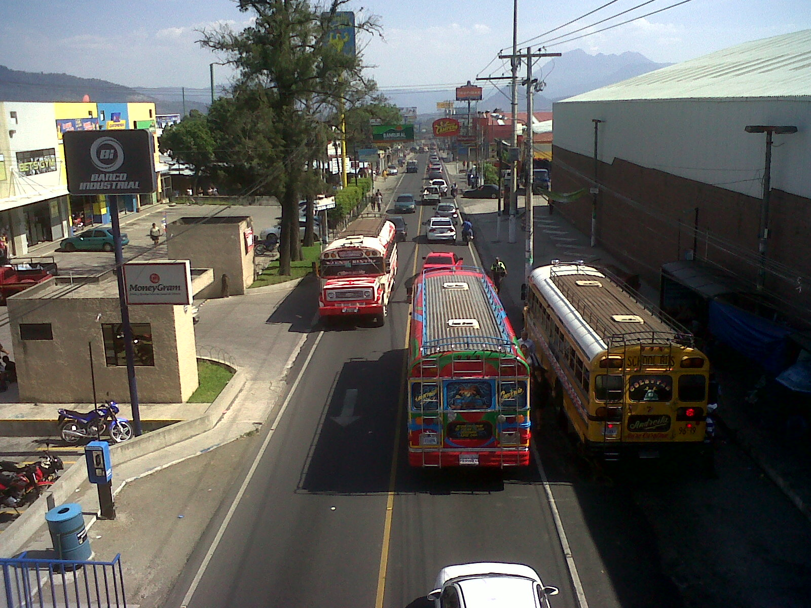 Avenida Boca del Monte